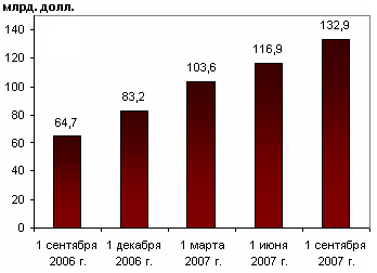 Lojban: zenba.